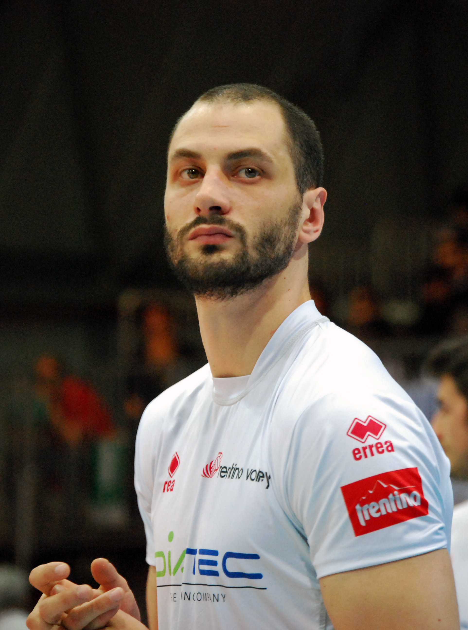 Matej Kazijski